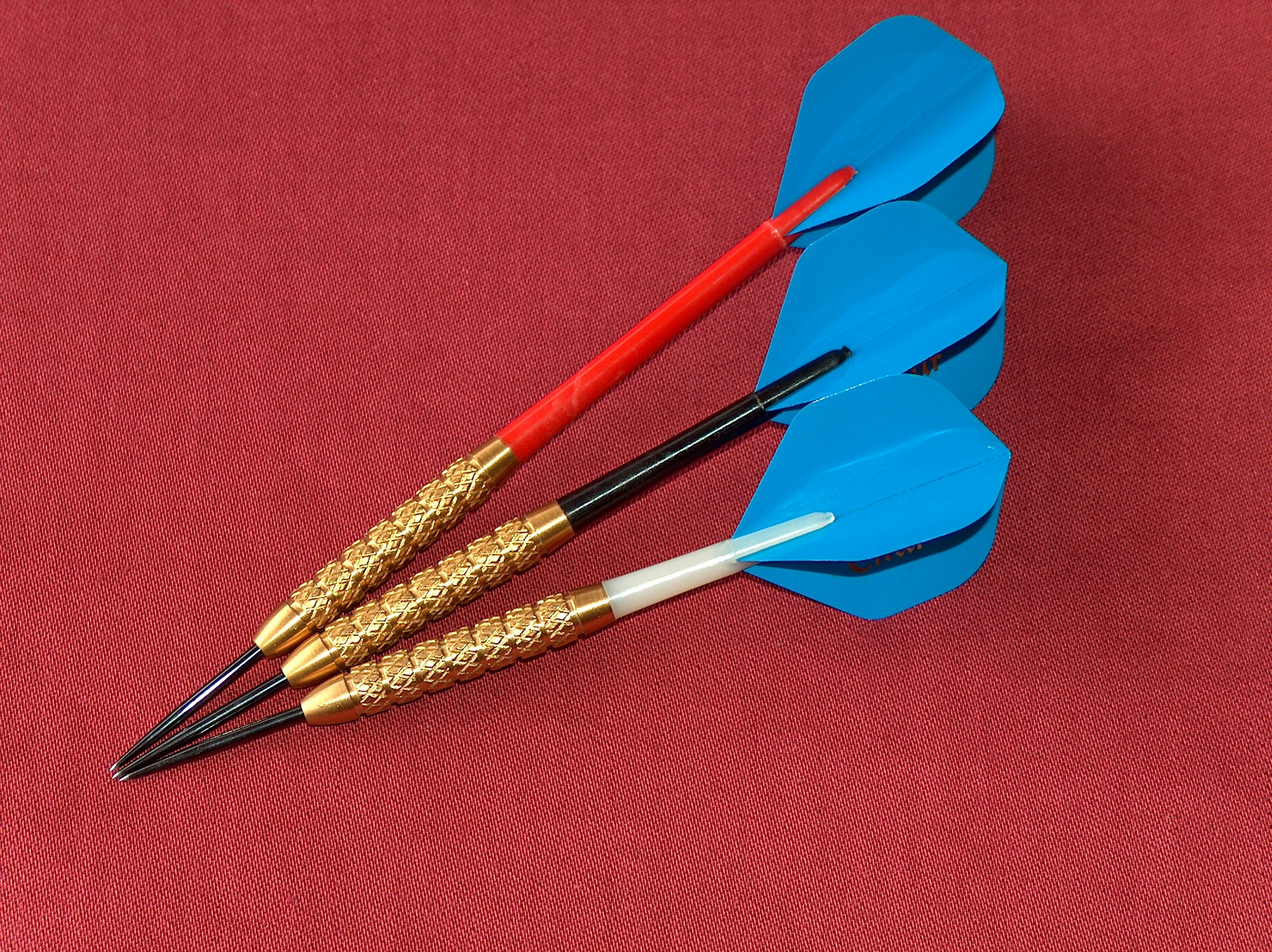 1 Set Steeldarts - Barrelgewicht 24 Gramm